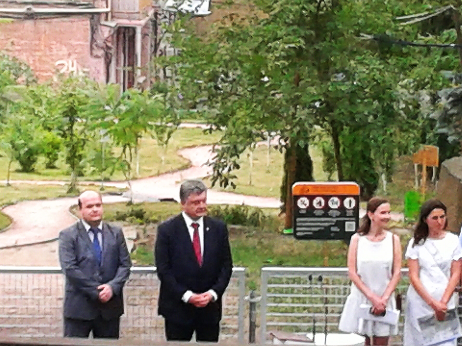 Президент України Петро Порошенко на відкритті скверу Небесної Сотні у Києві 10 липня 2015 року.